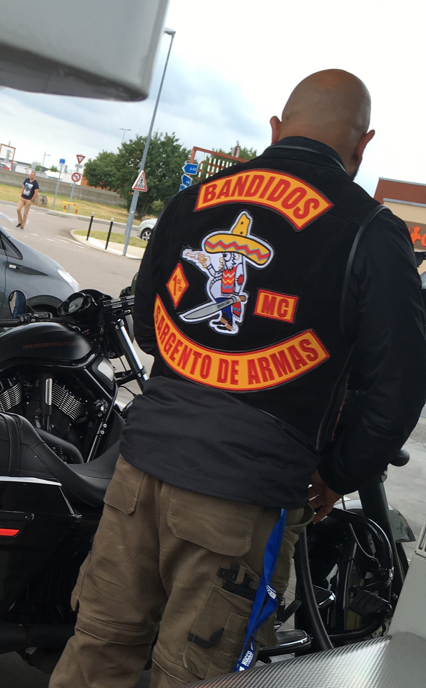 Bandidos Danois